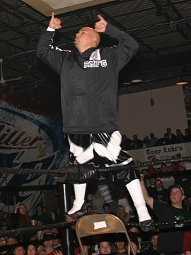 B-BOY